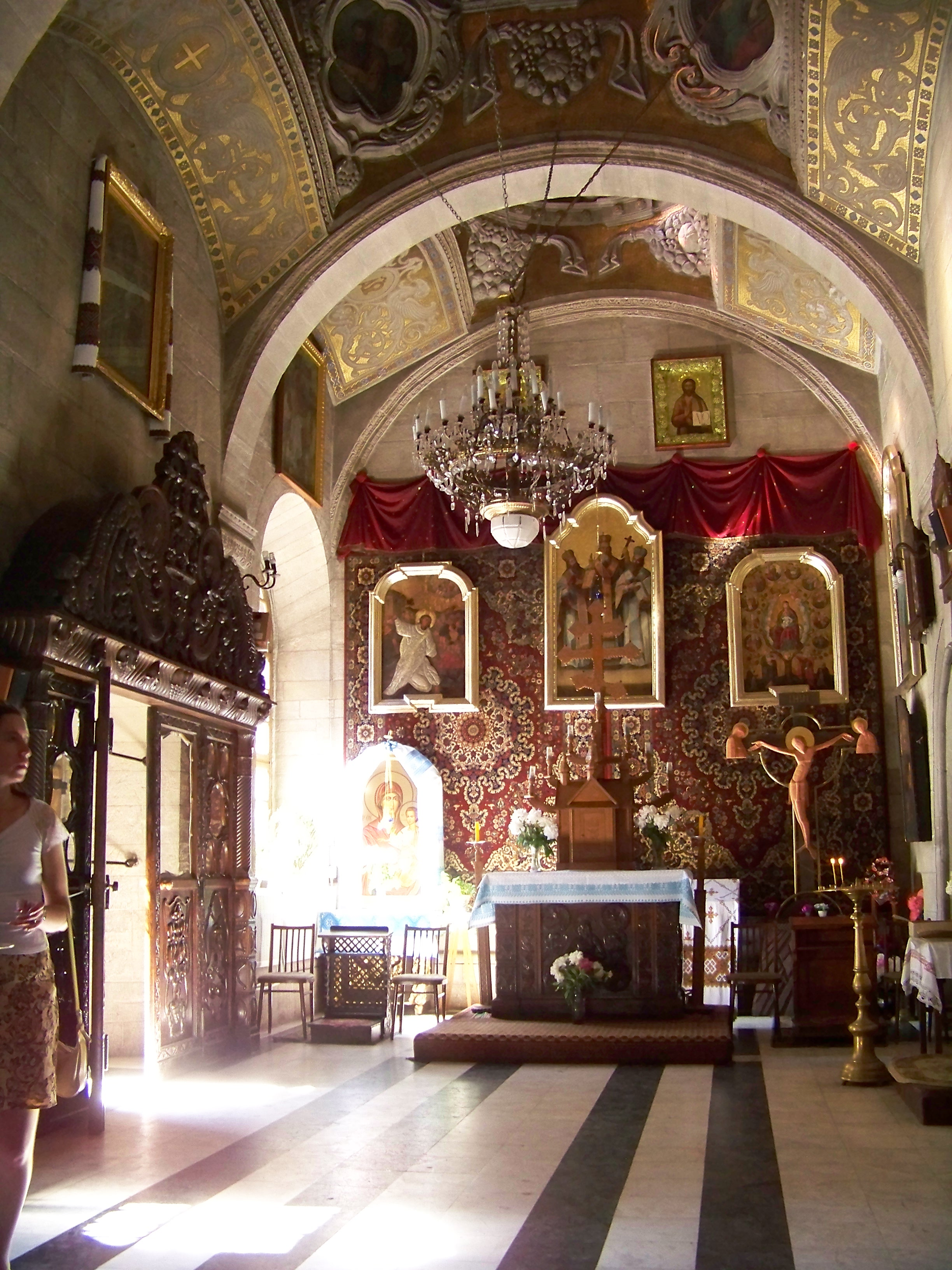 каплиця Трьох Святителів, Львів, Руська Інтер'єр